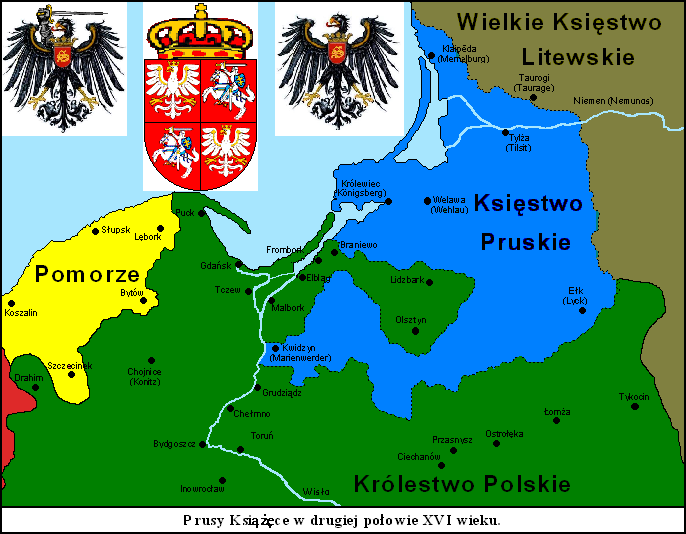 Mapa Prus w XVI wieku